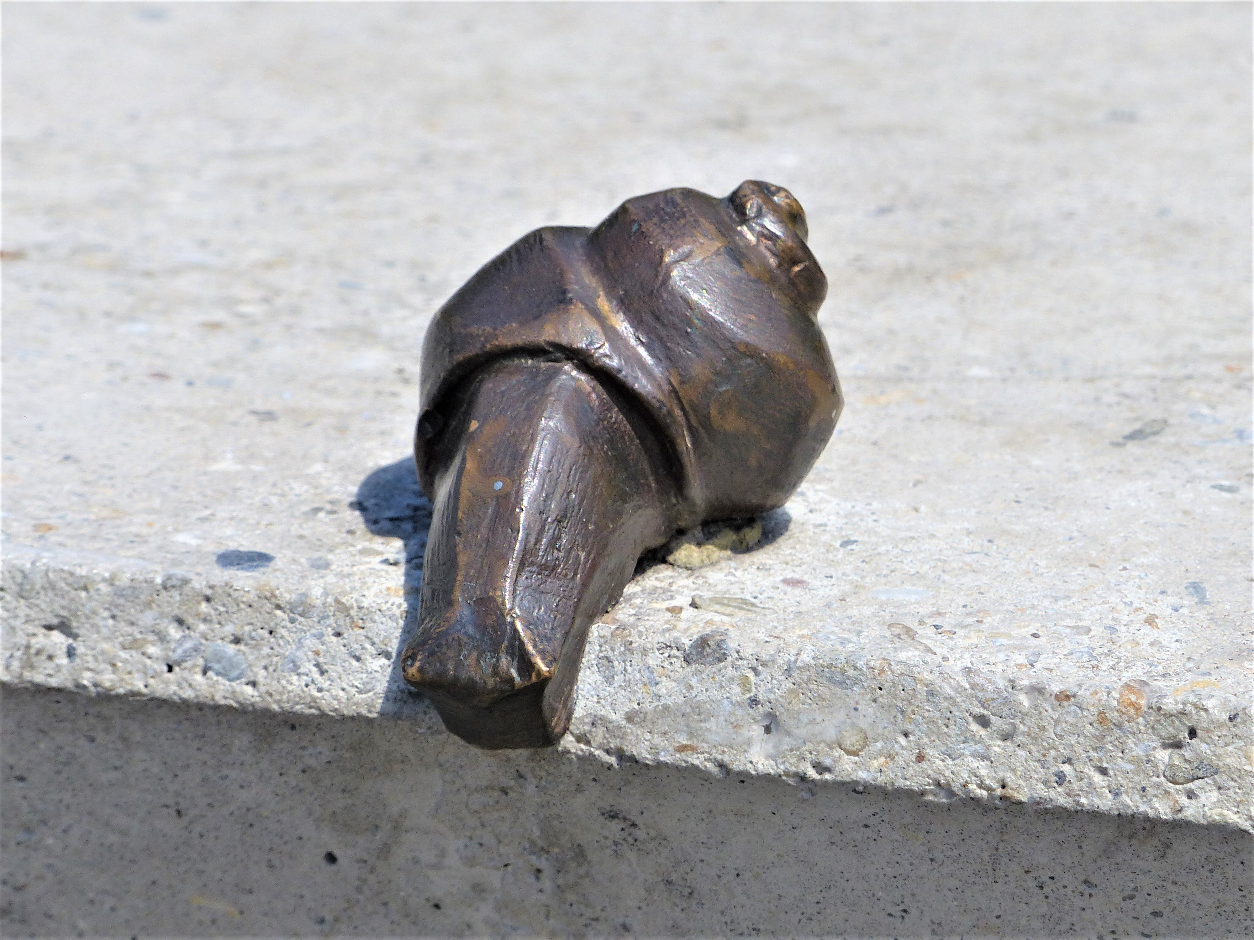 Kolodko Mihály (Mihajlo Kolodko) kis szobrai a Széll Kálmán téren.